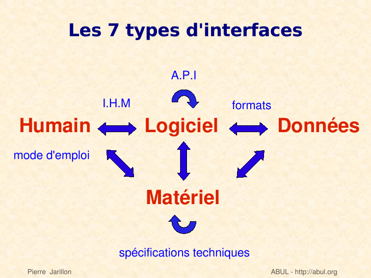 L'interopérabilité dépend de 7 types d'interfaces